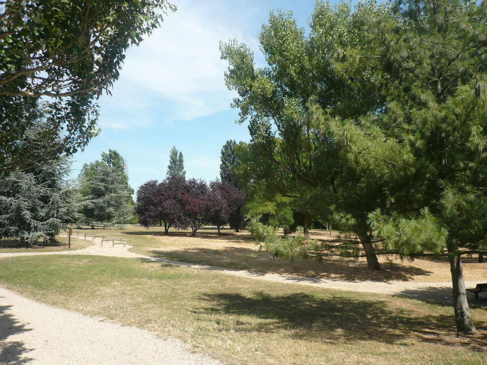 Parc des impressionistes